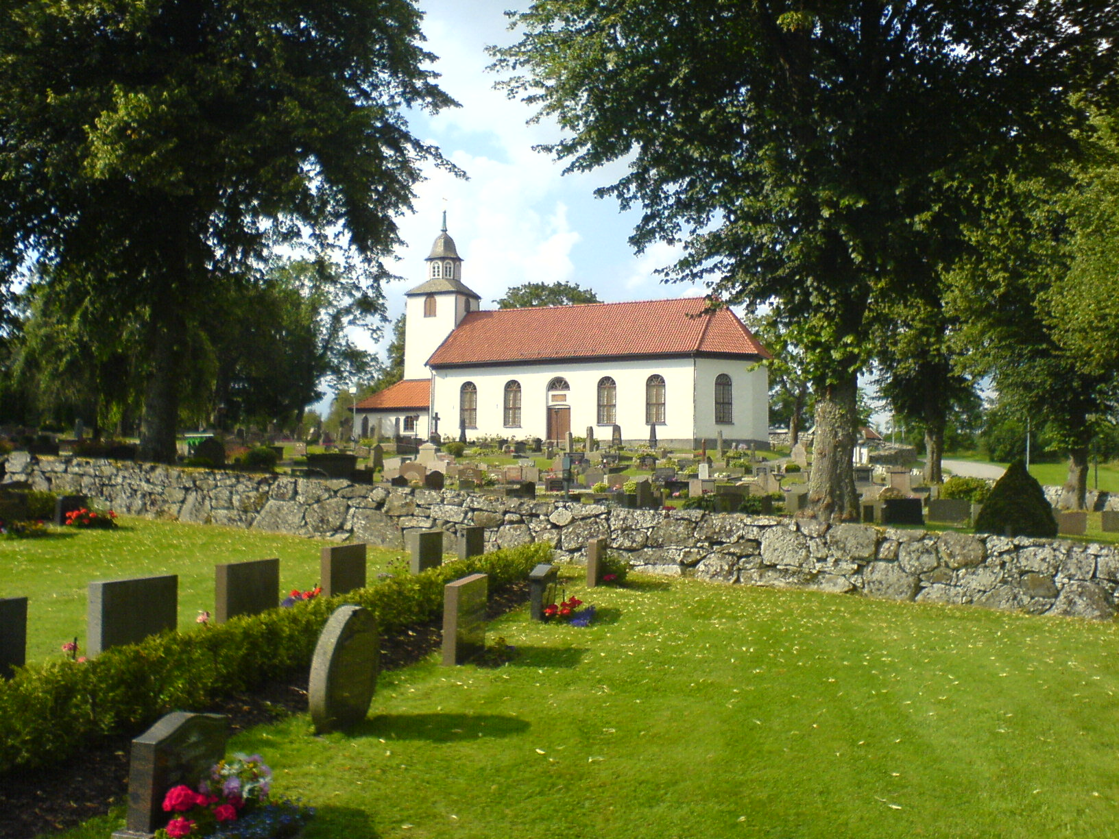 Norums kyrka från söder. Norums kyrka från sydost mellan träden. Norums kyrka. Norums kyrka ur ett annat perspektiv. Norums kyrka är församlingskyrka i Norums församling, som fram till 1845 var annexförsamling till Spekeröd. Norums kyrka i Inlands Nordre härad.